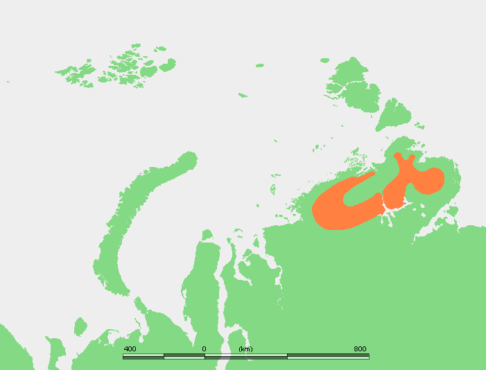 schema pohoří Byrranga